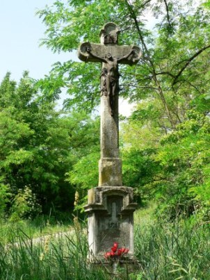 A felsőnyéki szőlőhegyen lévő, 1881-ben felavatott kőkereszt (Tolna megye, Magyarország)